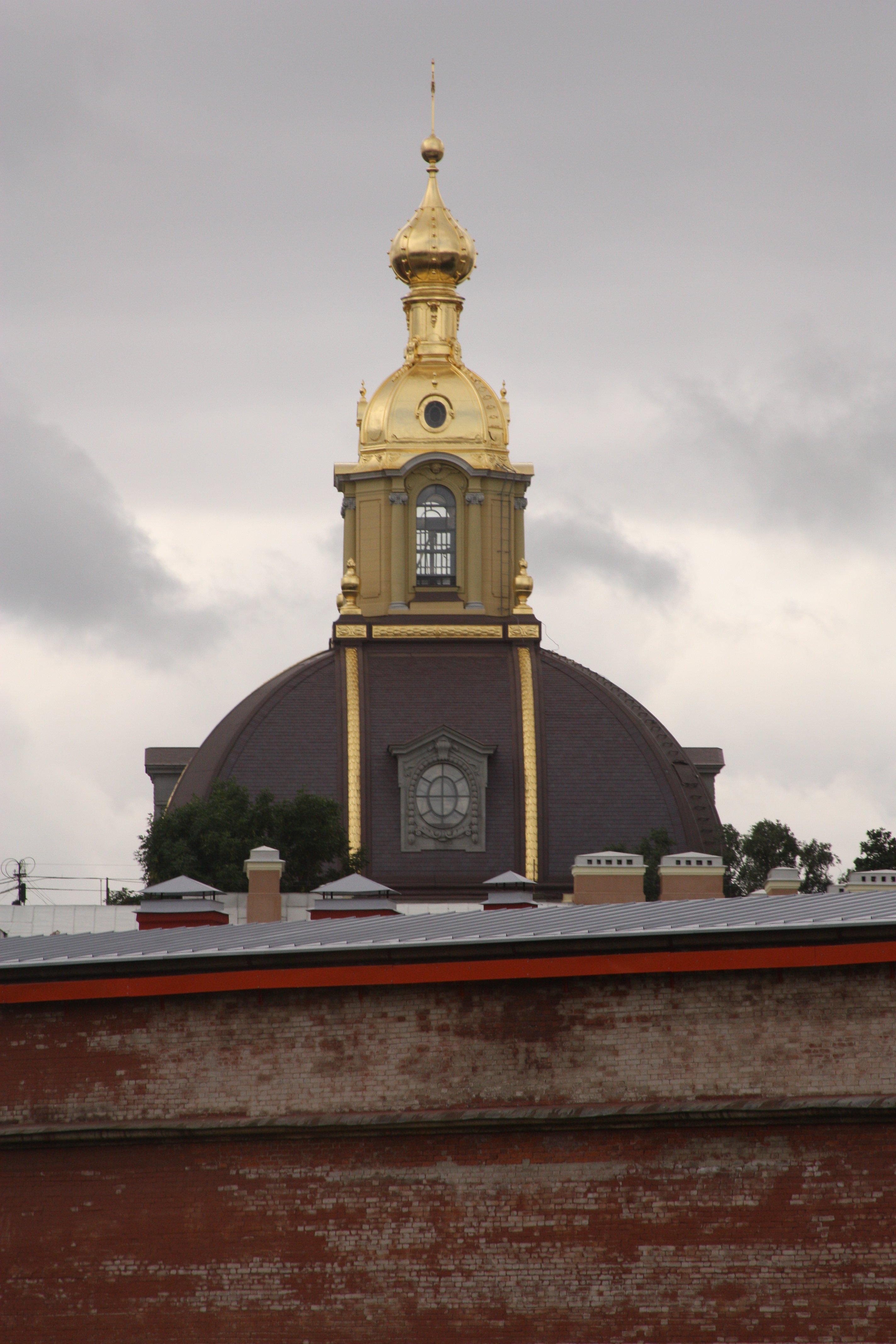 Sankt Petersburg; 2009; Touristenfotos